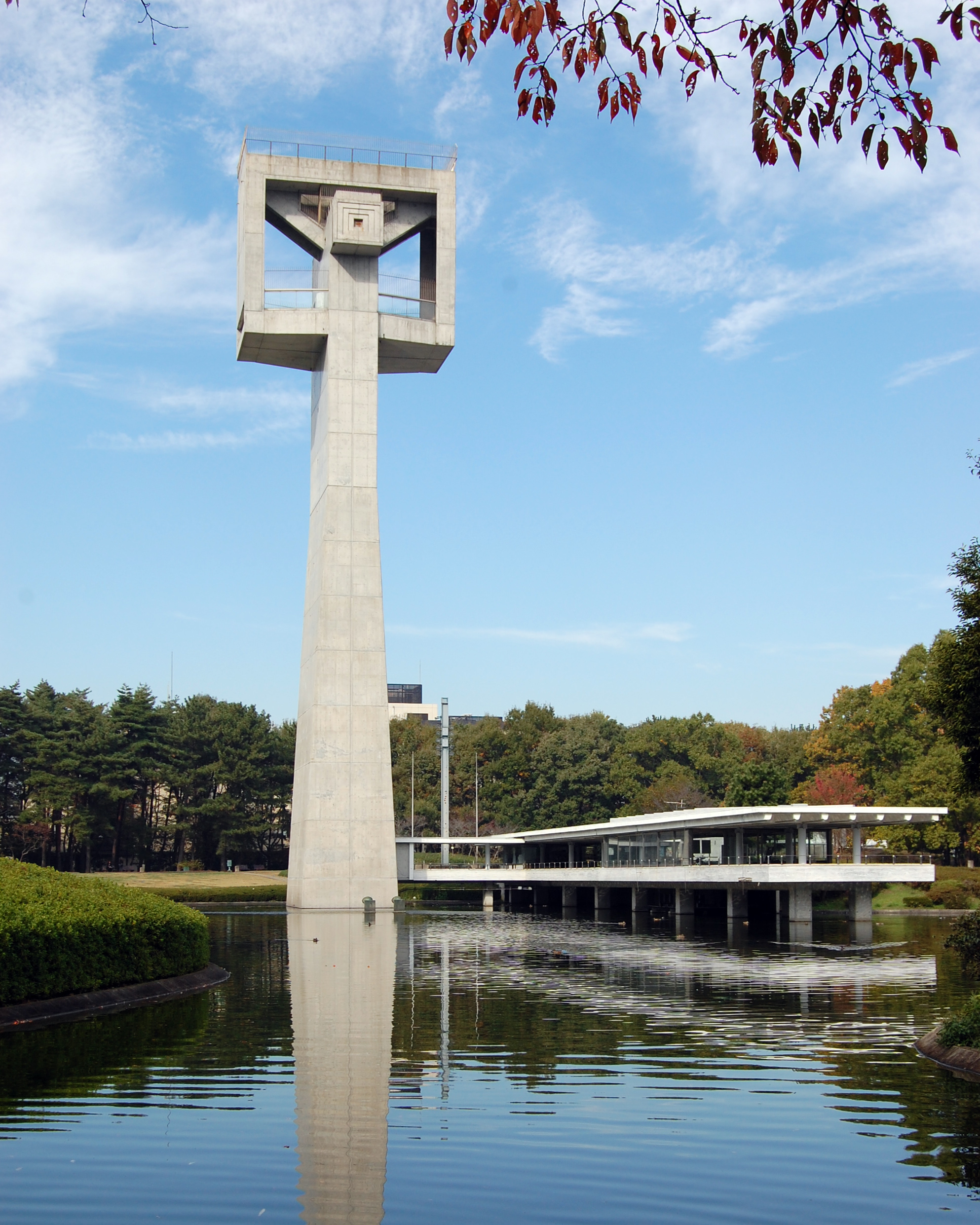 Matumi Tower, design by Kiyonori Kikutake, 1976.